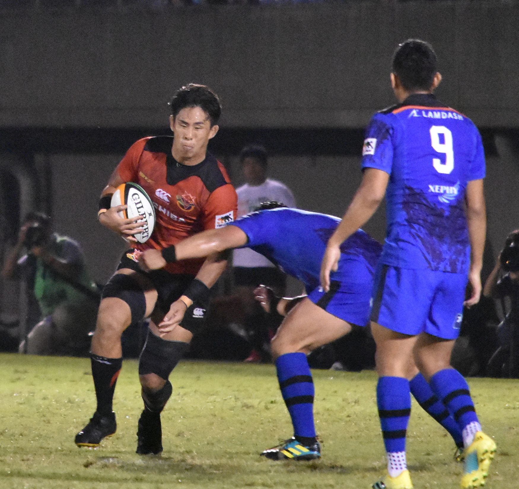 徳永 祥尭